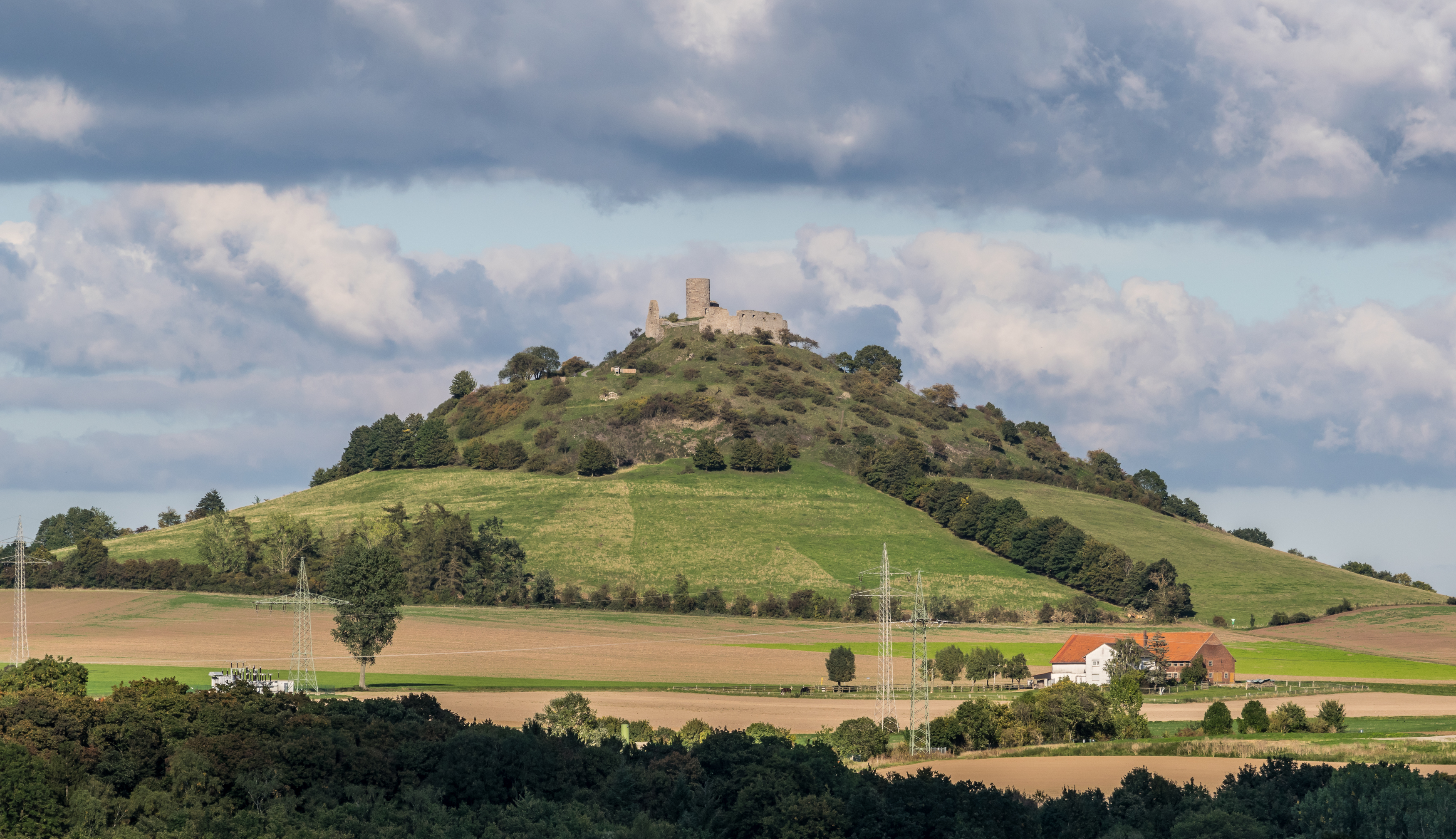 Burg Desenberg auf dem gleichnamigen Berg bei Warburg; Südwestseite